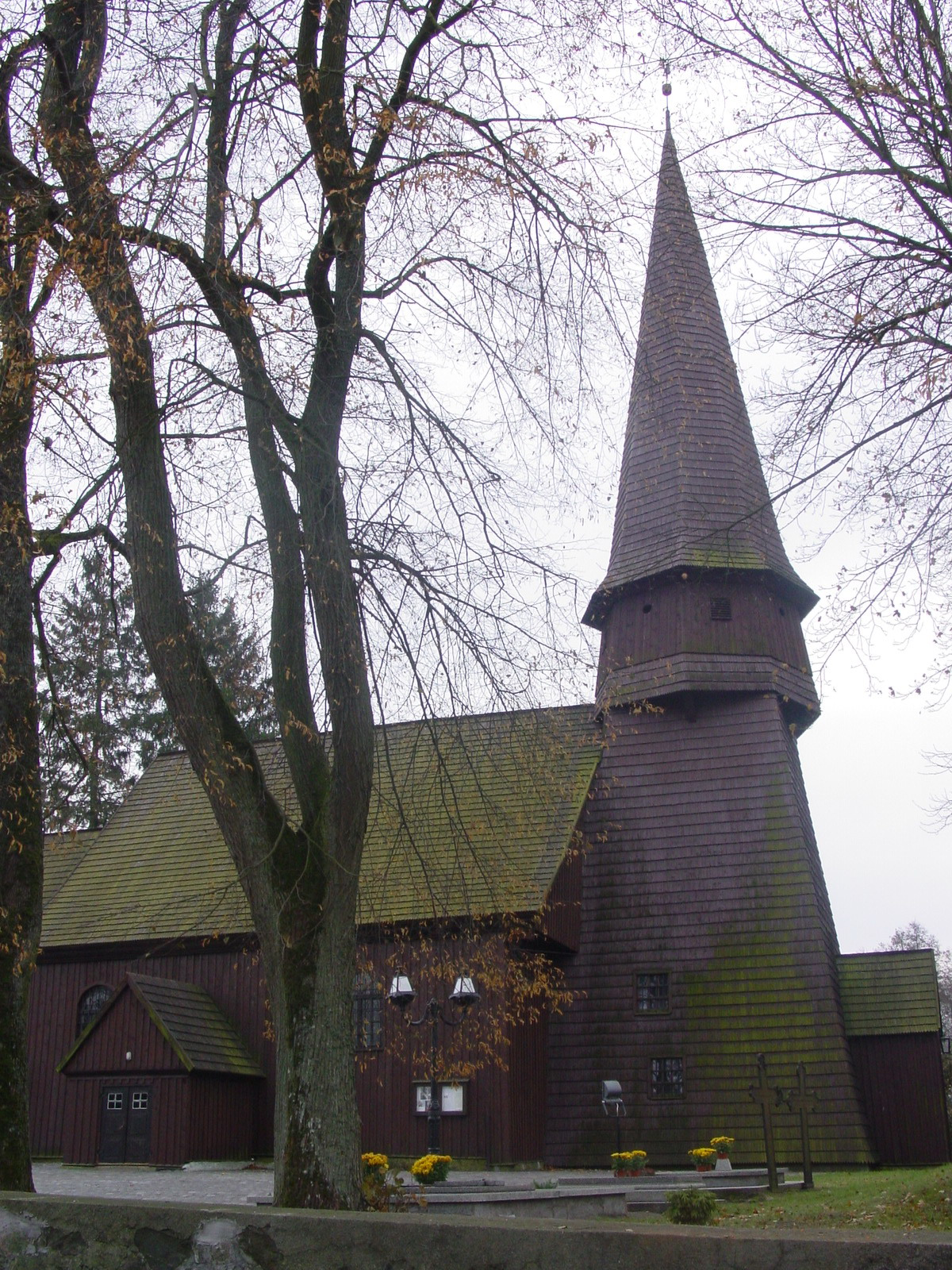 Leśno. Zabytkowy modrzewiowy kościół z XVII w. Autor fot. Stako, 1 listopada 2003.